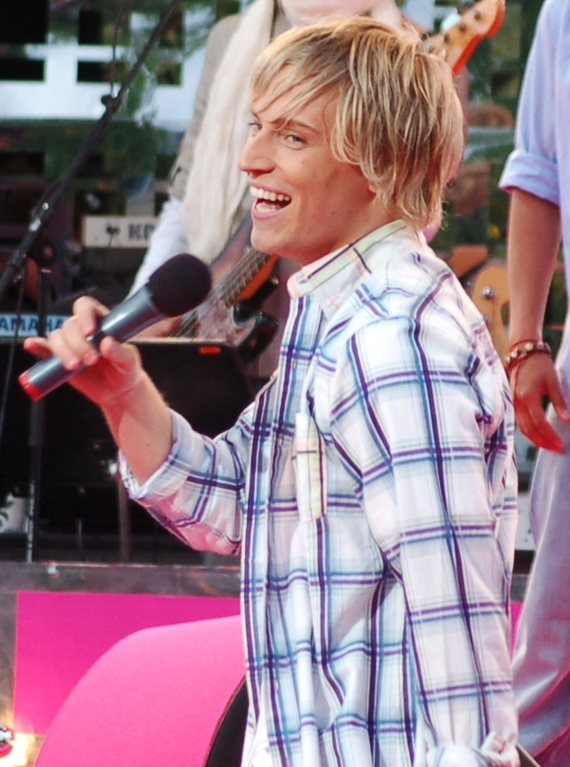 Ola sjunger på Gröna Lund I Stockholm